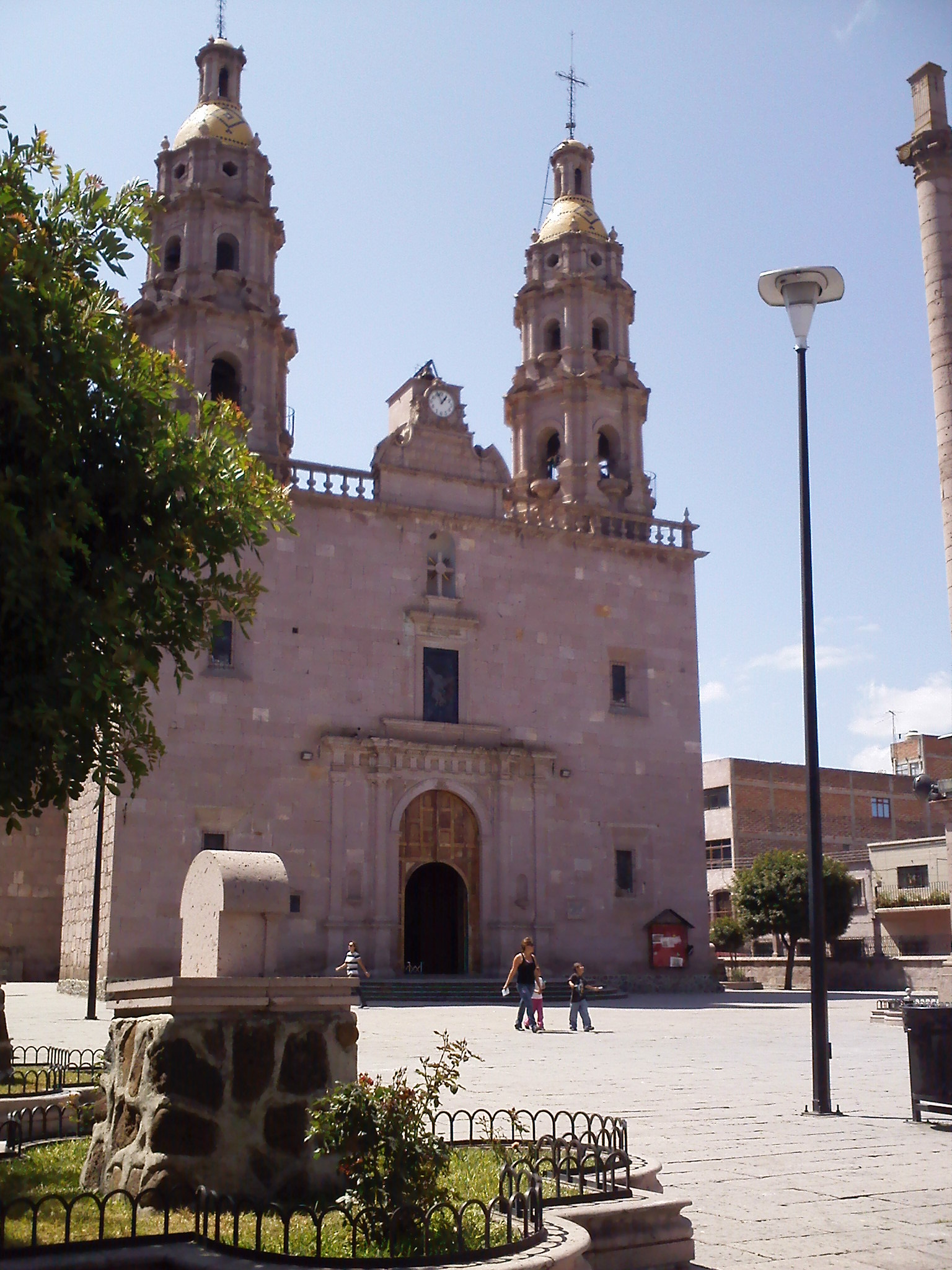 Parroquia de San Miguel Arcangel en San Miguel el Alto